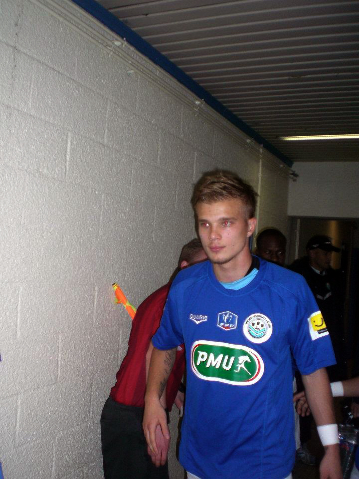 Rémi Biancardini avant le début du match Avion / Tours - septième tour de la Coupe de France de Football à Avion le 19 novembre 2011